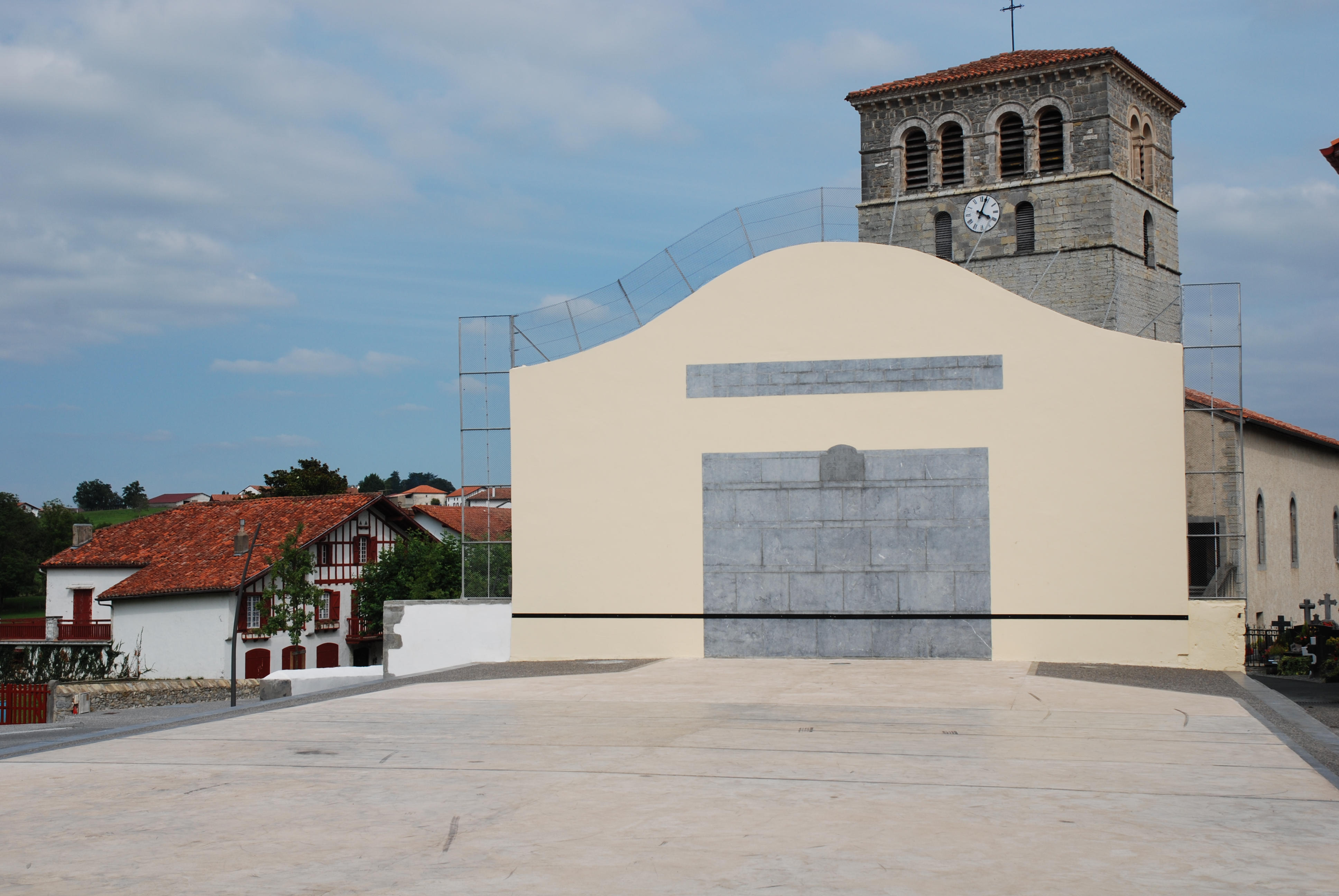 Irissarry, le fronton place libre, adossé à l'église Saint-Jean-Baptiste